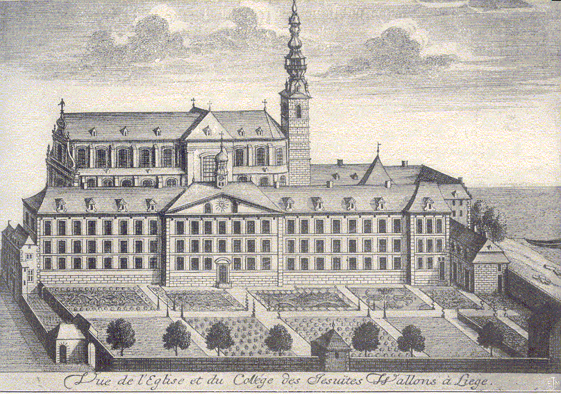 Gravure de l'ancien collège des jésuites de Liège, en Belgique (1740)